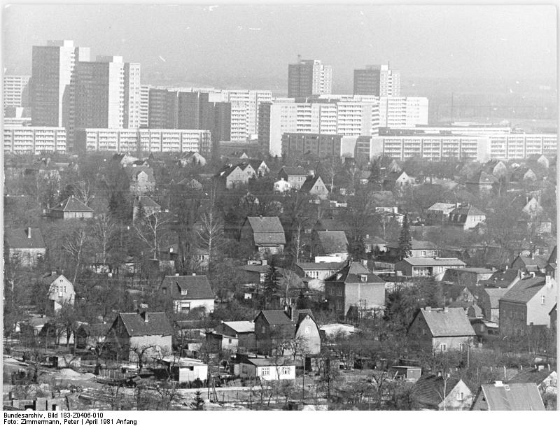 ADN-ZB-Zimmermann-6.4.81-Berlin: Alt und neu fügt sich zusammen. Im Vordergrund Biesdorf mit seinen Siedlungshäusern und im Hintergrund die neuen Fassaden des Wohngebiets 2 von Marzahn. Neben dem weiteren Fortschreiten des Neubaus sieht der Volkswirtschaftsplan des Stadtbezirks Marzahn die Steigerung der Baupraduktion für Modernisierung, Um- und Ausbau von Wohnungen auf 166,7 Prozent in diesem Jahr vor. Auch der individuelle Eigenheimbau wird in diesem Stadtbezirk gefördert. Information added by Wikimedia users. Das Foto ist in Richtung NNO aufgenommen und zeigt links das Doppelhochhaus Kienbergstraße.